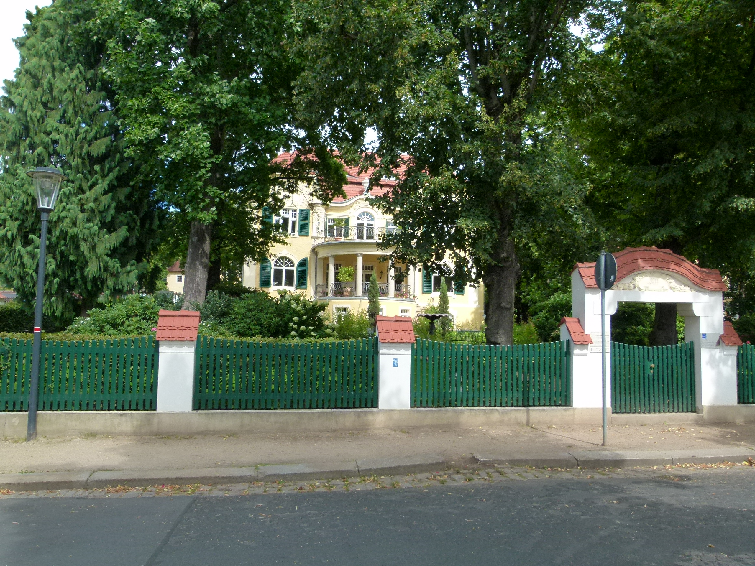 Denkmalgeschütztes Haus, Augustusweg 44, Radebeul, Sachsen